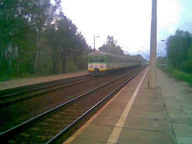 Przystanek kolejowy Mokra Wieś. Na przystanek wjeżdża pociąg Kolei Mazowieckich z Małkinii do Warszawy Wileńskiej.